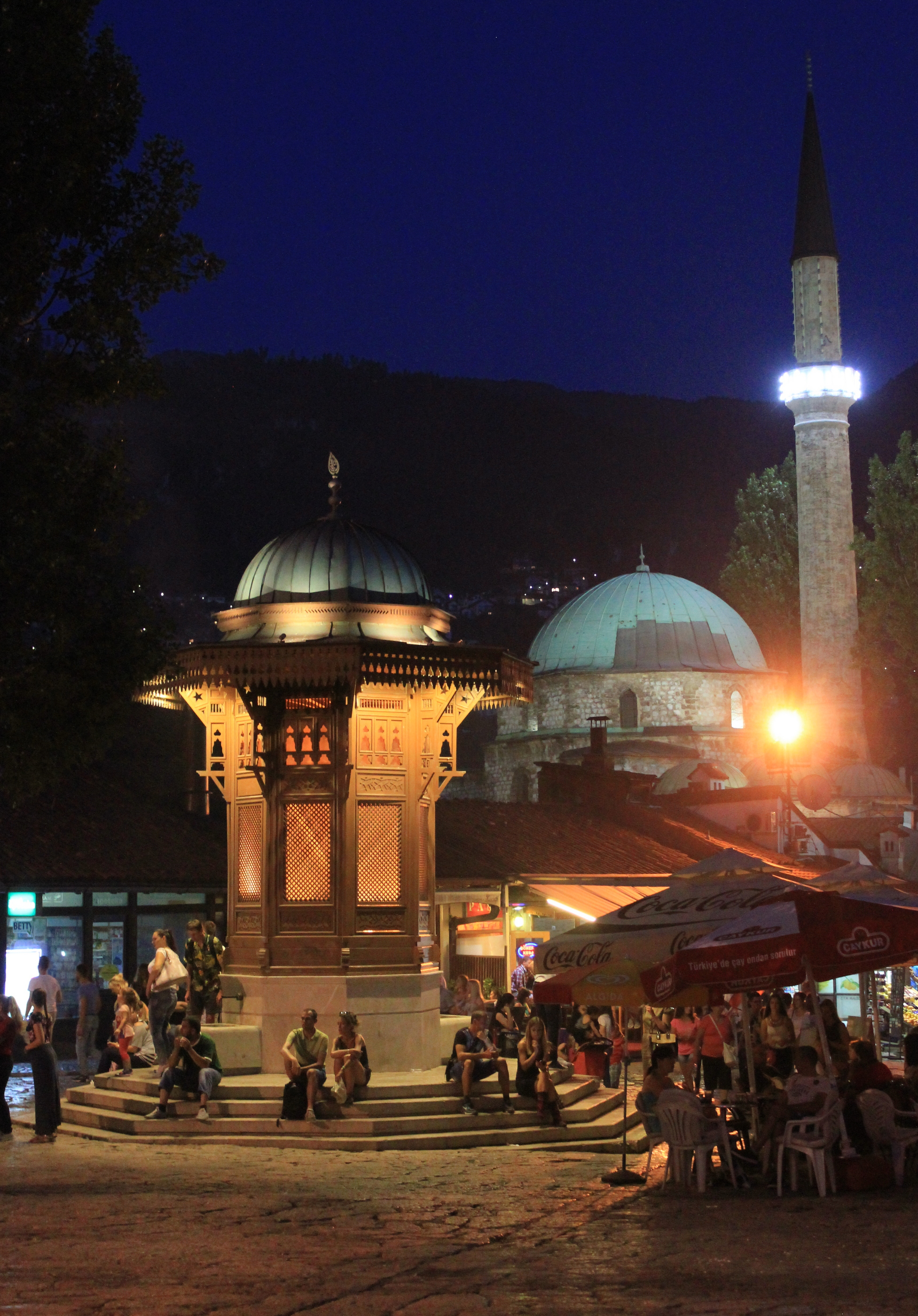 Der Sebilj in Sarajevo.